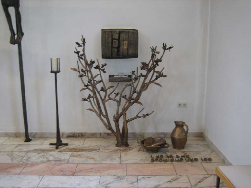 Tabernakel im katholischen Teil der Pfarrkirche Pfarrkirche St. Johannes Baptist Rödgen